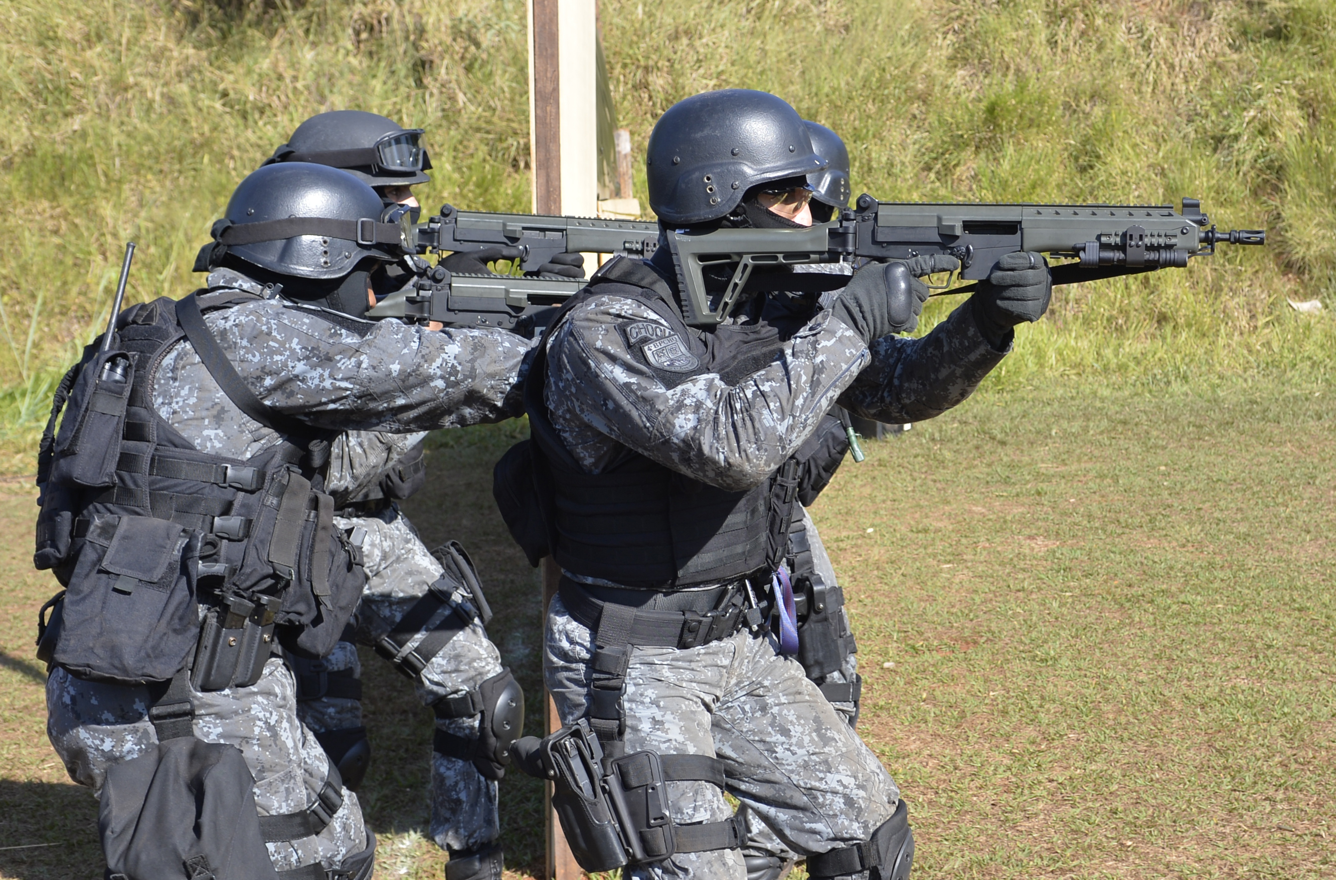 10/05/2016, Goiânia - GO Fotos: Gilberto Alves